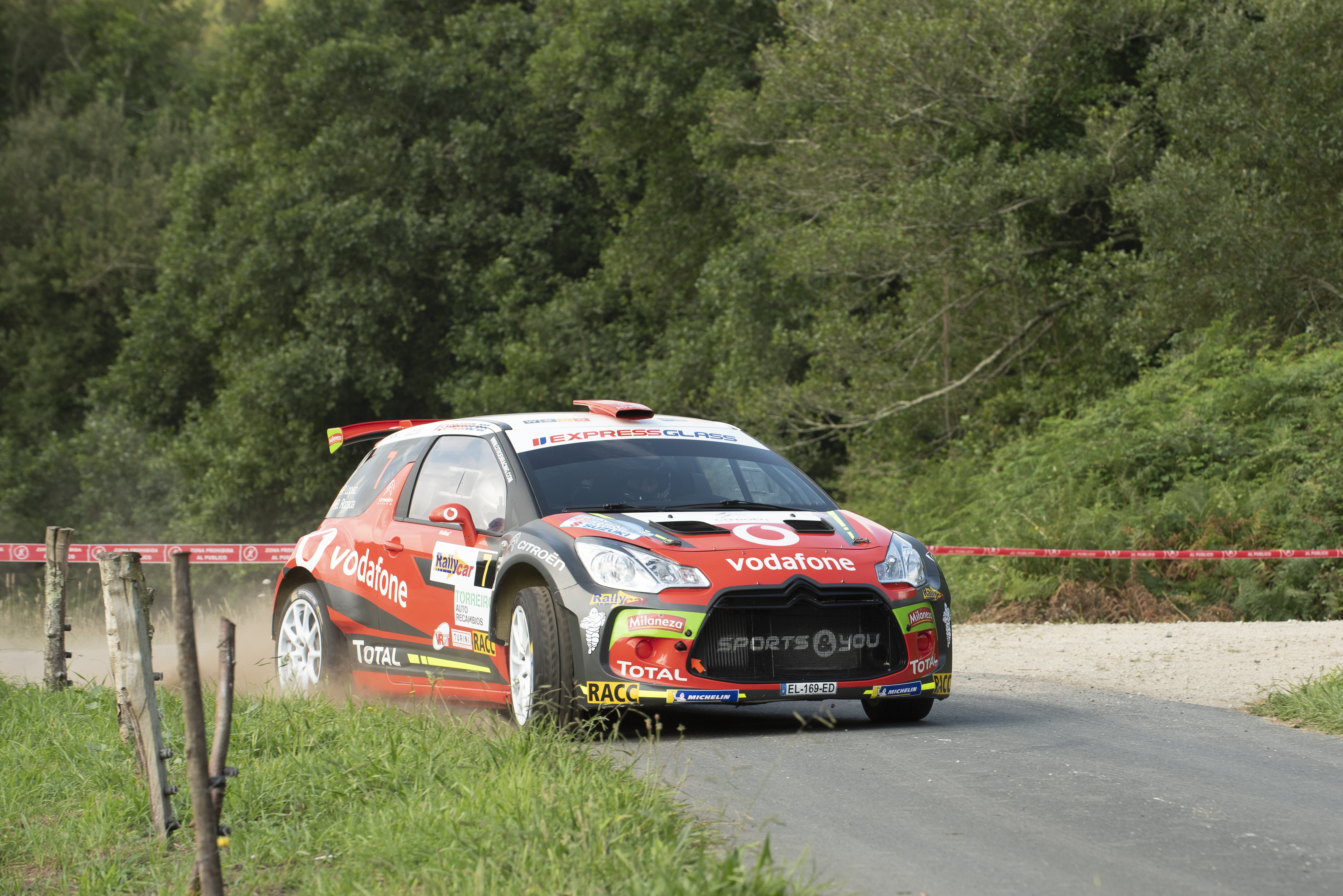 Pepe Lopez vencedor 49 Rally Ferrol 2018